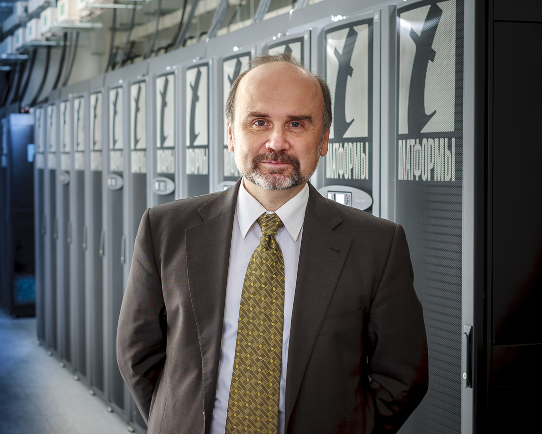 Владимир Валентинович Воеводин, член-корр. РАН, зам. директора Научно-исследовательского вычислительного центра МГУ